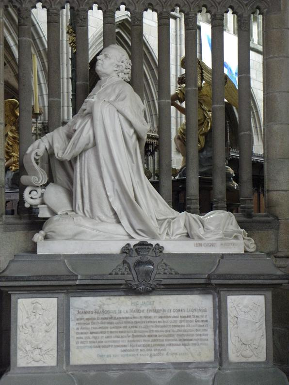 Monument funéraire de Mgr de La Marche en la cathédrale Saint-Paul-Aurélien à Saint-Pol-de-Léon (29).